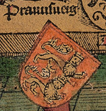 Wappen des Herzogtums Braunschweig-Lüneburg in der Schedel'schen Weltchronik von 1493, Blatt 183v